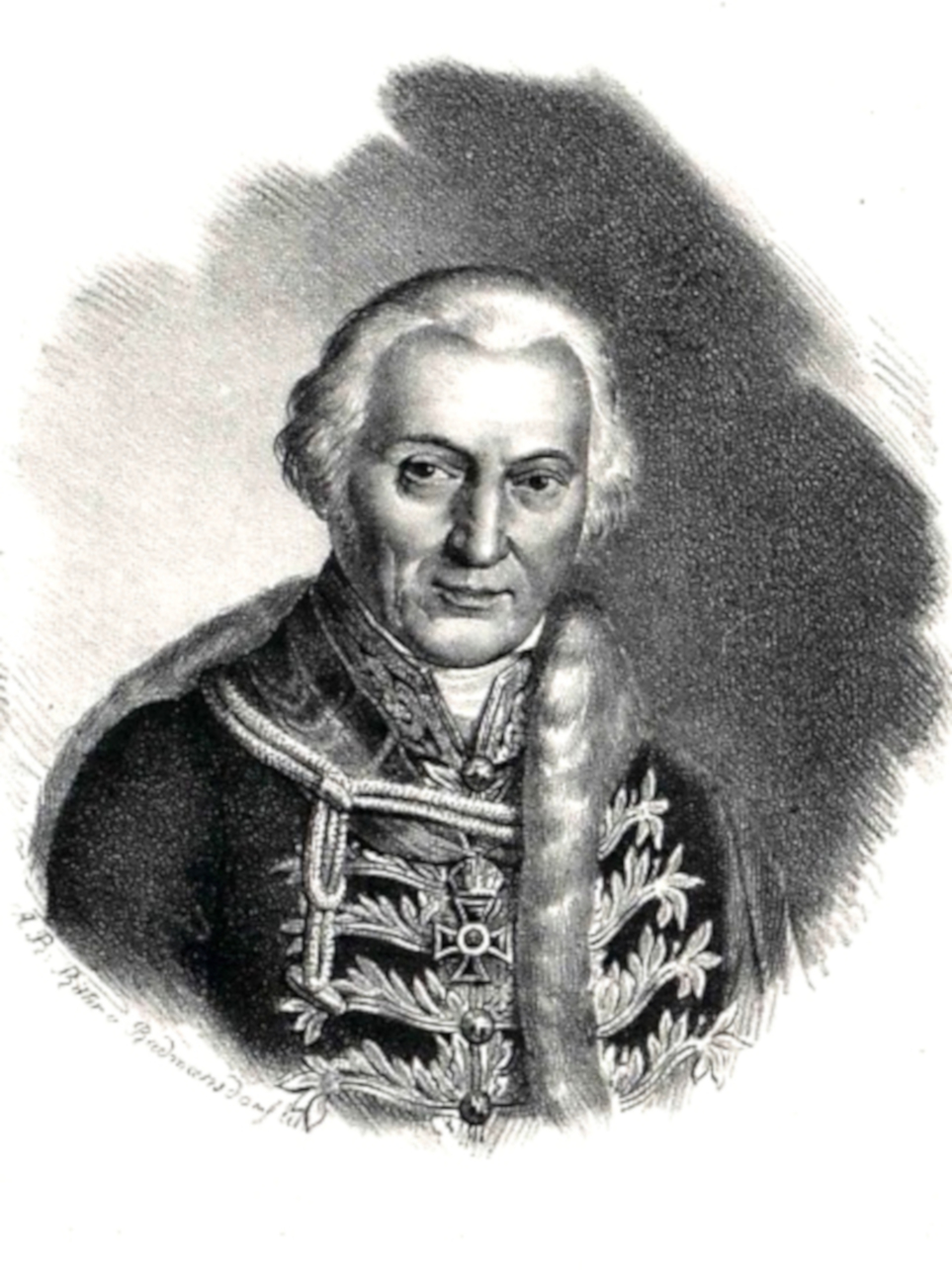 Görög Demeter (1760–1833) lapszerkesztő, mecénás, térképész, szőlőnemesítő, a Magyar Tudományos Akadémia tiszteleti tagja portréja. Korabeli kőrajz